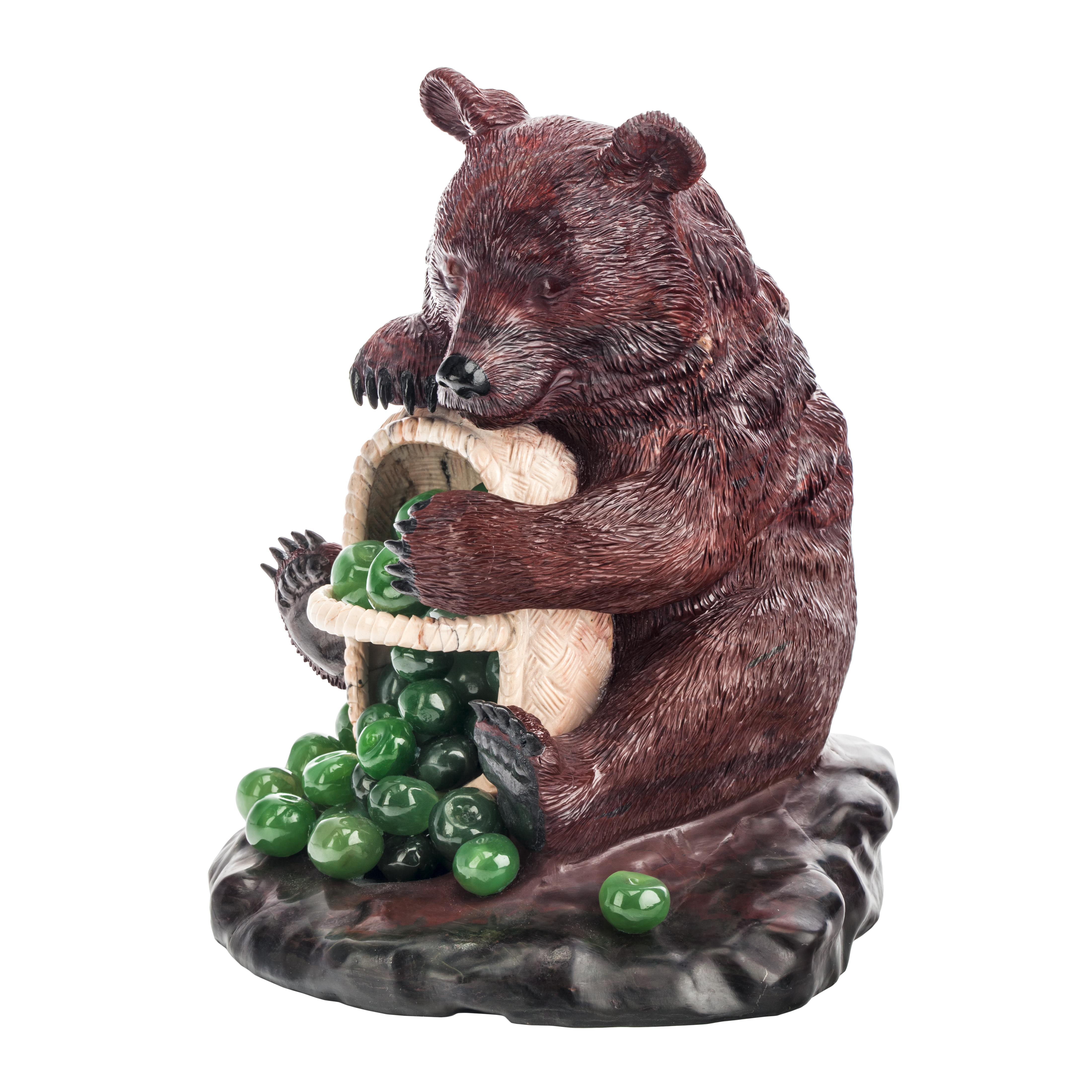 Медвежонок с яблоками. ООО «Ювелирный Дом Моисейкин». Хозяин леса вырезан из цельного куска башкирской яшмы. Разглядев образ, заключенный в камне, мастер-камнерез бережно высвободил его, превратив в удивительное произведение. Изображение животного в такой естественной позе требует от мастера досконального знания его анатомии и повадок. Рисунок камня, сочетающий в себе переходы оттенков от темно-бурого до черного, дал возможность передать нюансы окраса медведя. Фактура медвежьей шерсти, укрывающей могучие мышцы, передана с помощью ручной гравировки. Когти и подушечки лап выполнены из вулканического долерита. Мудрый, богатырского сложения мишка собирает нефритовые яблоки в корзину, он излучает тепло гостеприимства и доброжелательность.